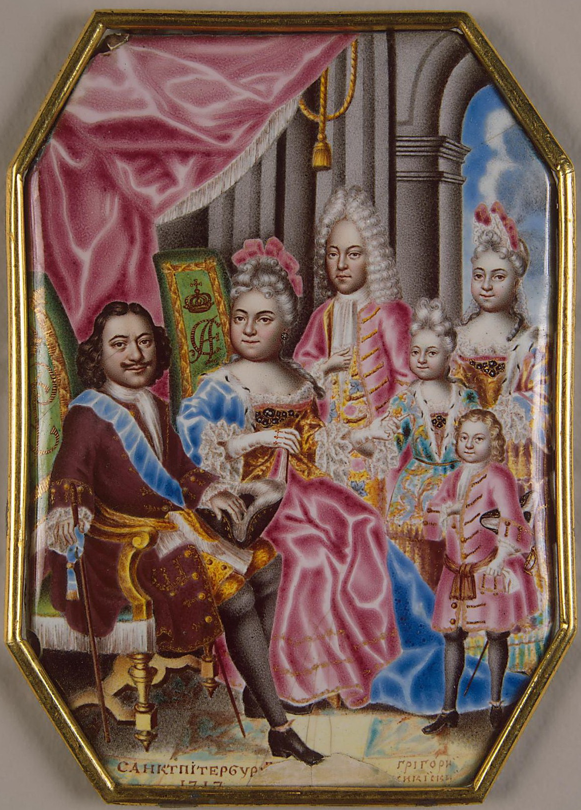 The family of the russian tsar Peter I: Peter, his 2-nd wife Ekaterina Alekseevna, two daughters and small son Peter from Ekaterina, oldest son Aleksej from 1-st wife. Emal on copper: 12х8.5 cm. State Hermitage, S.-Peterburg. Мусикийский, Григорий Семенович Миниатюра на эмали: Портрет семьи Петра I Россия, 1716/1717 гг. медь, эмаль, роспись 12х8,5 см ЭРР-3798